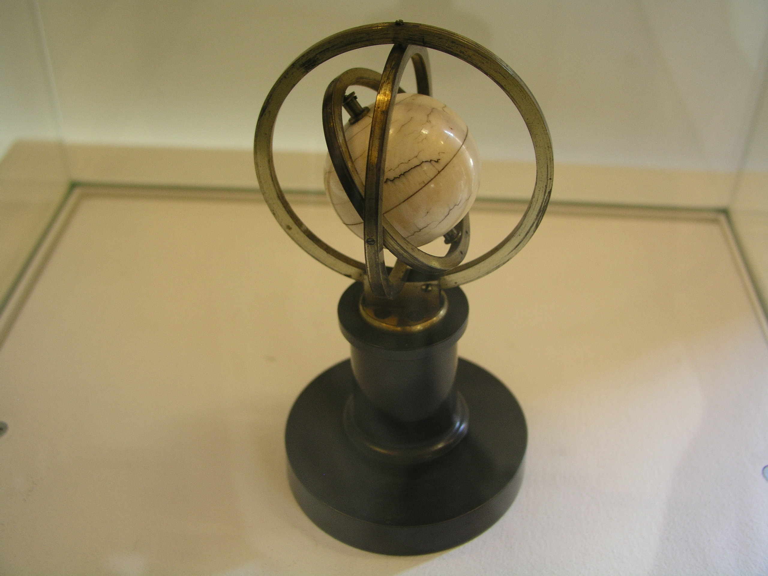 Das Original-Gyroskop von Prof. Bohnenberger aus dem Tübinger Stadtmuseum.